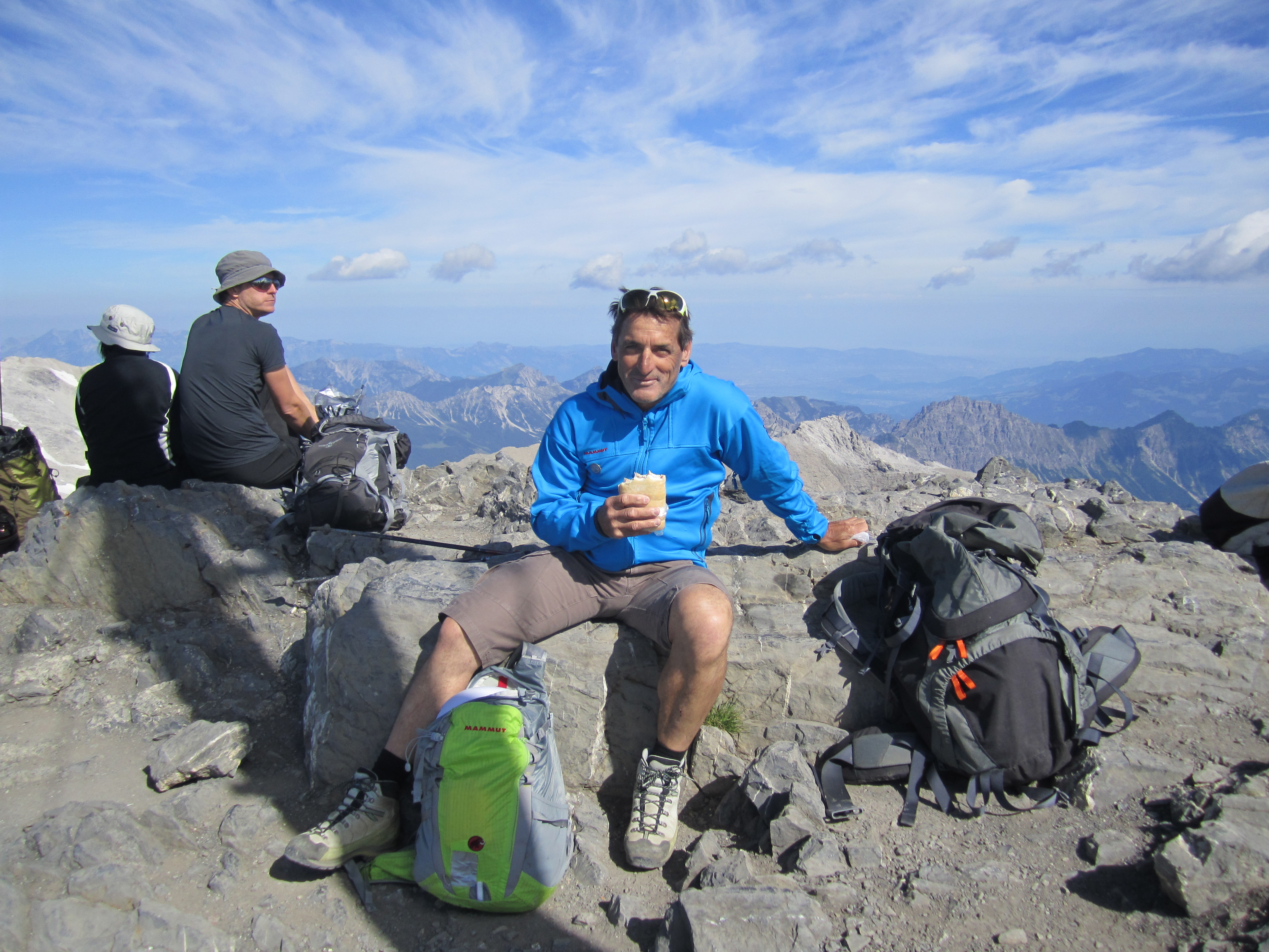 op de Schesaplana